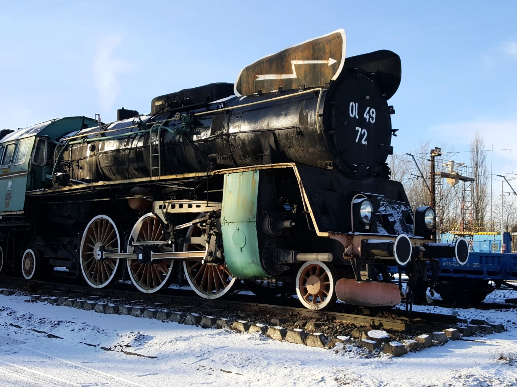 Lokomotywa parowa Ol 49-72 w Tarnowie